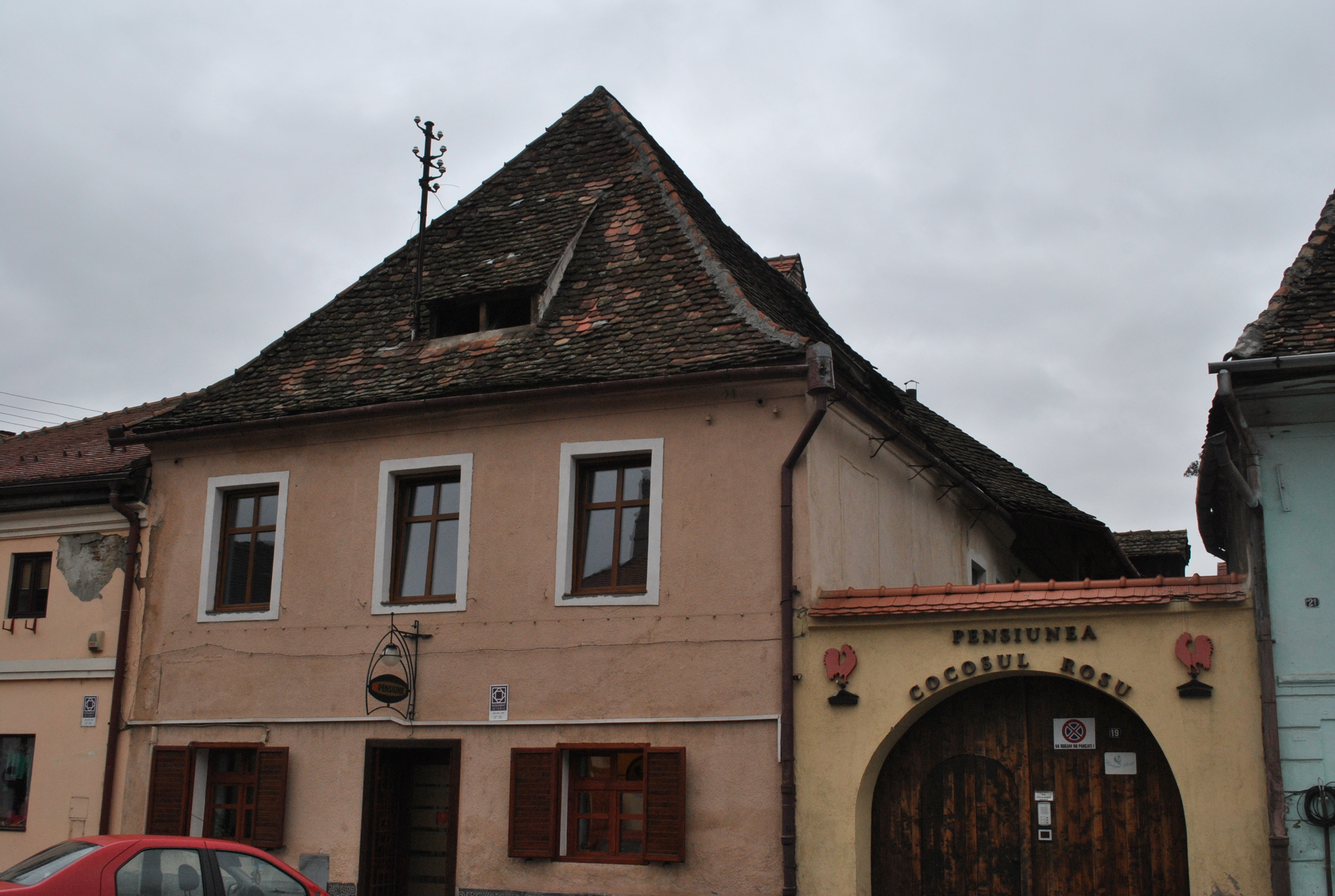 Casă, sec. XVII - XVIII